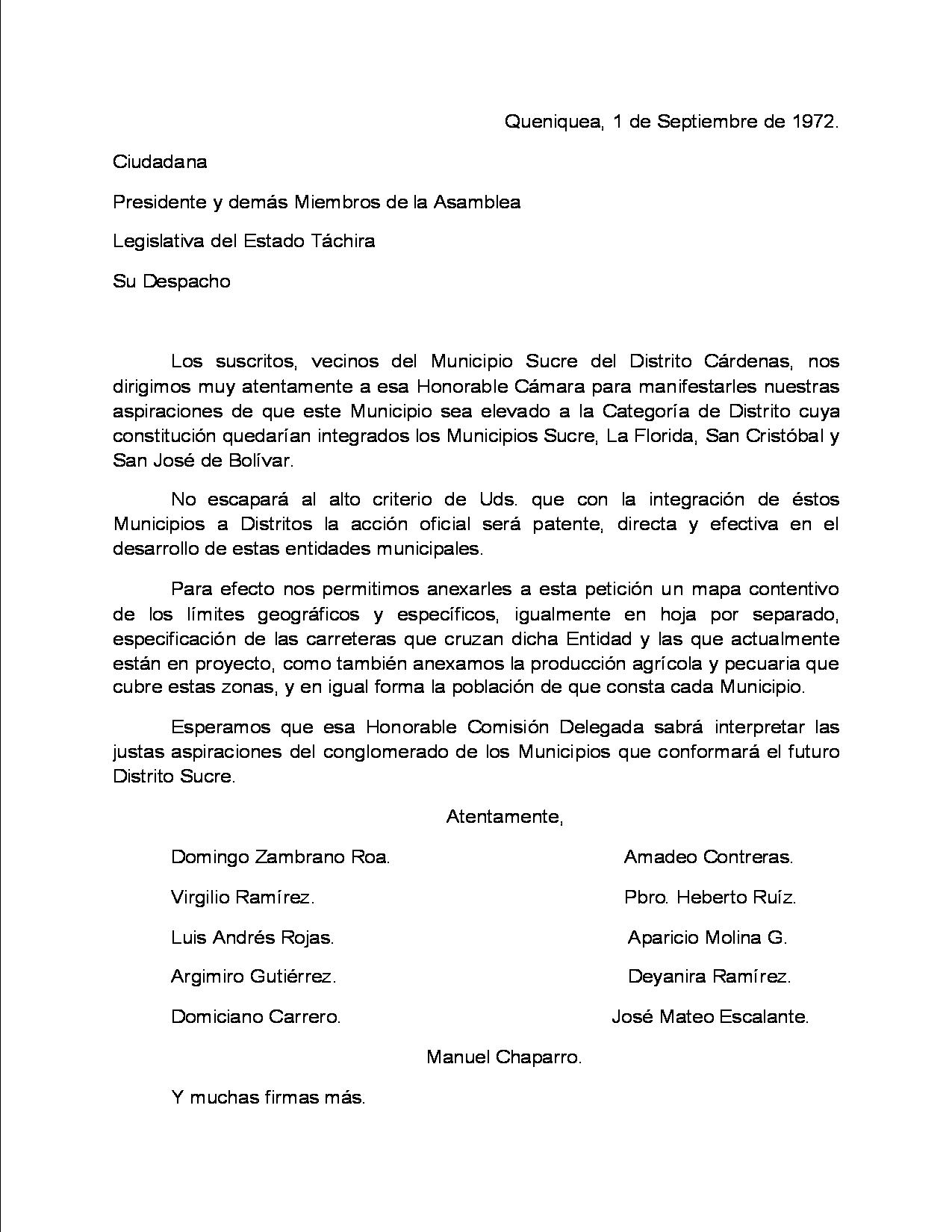 Documento de Elevación a Distrito, Municipio Sucre, Estado Táchira. Se encuentra en el libro UNA MIRADA A LAS HISTORIA DEL MUNICIPIO SUCRE, del Señor Aparicio Molina, Cronista de Queniquea.